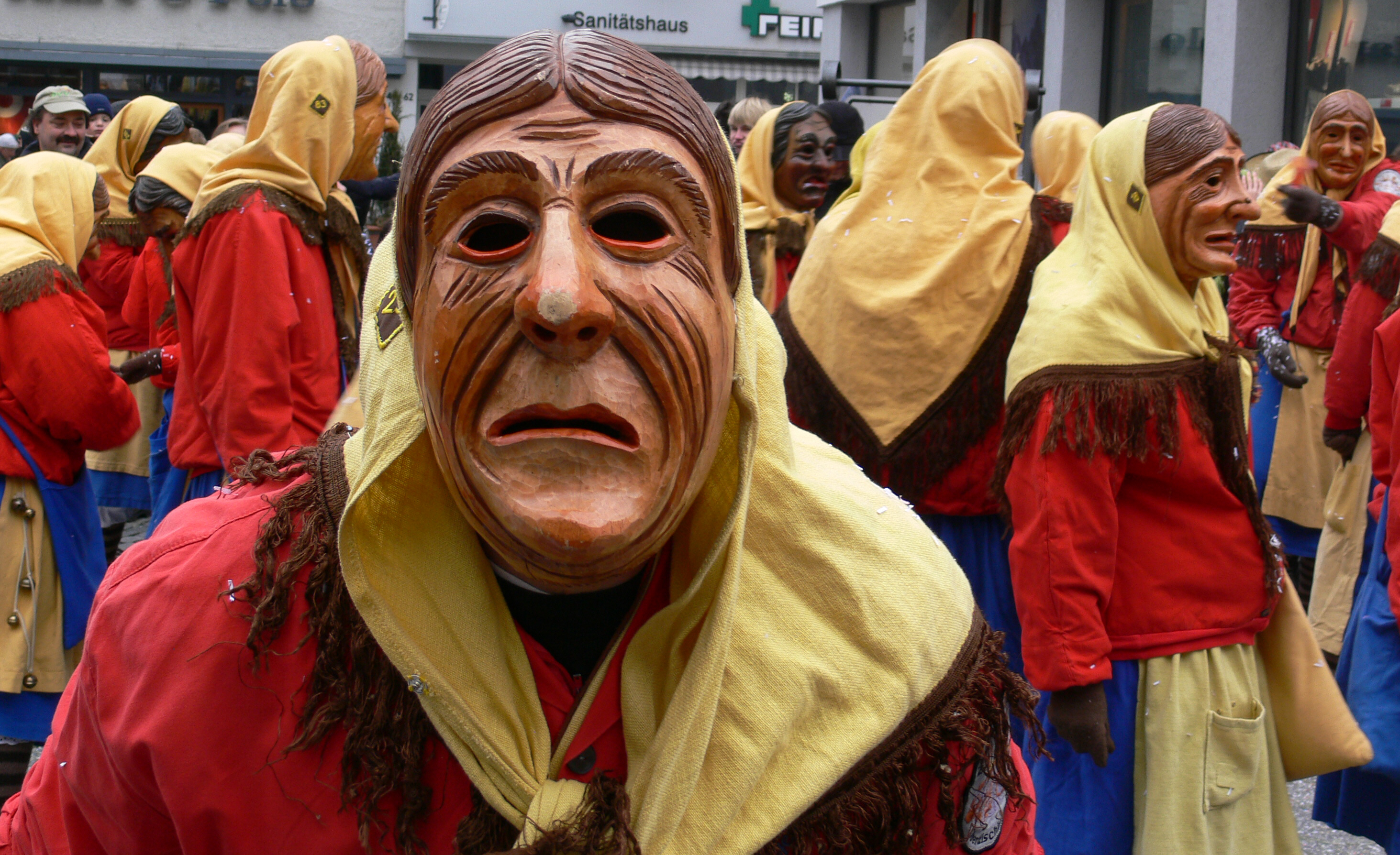 Narrensprung am Fasnetsmontag, 4. Februar 2008 in Ravensburg: Malefizweiber der Narrengesellschaft Oberdischingen